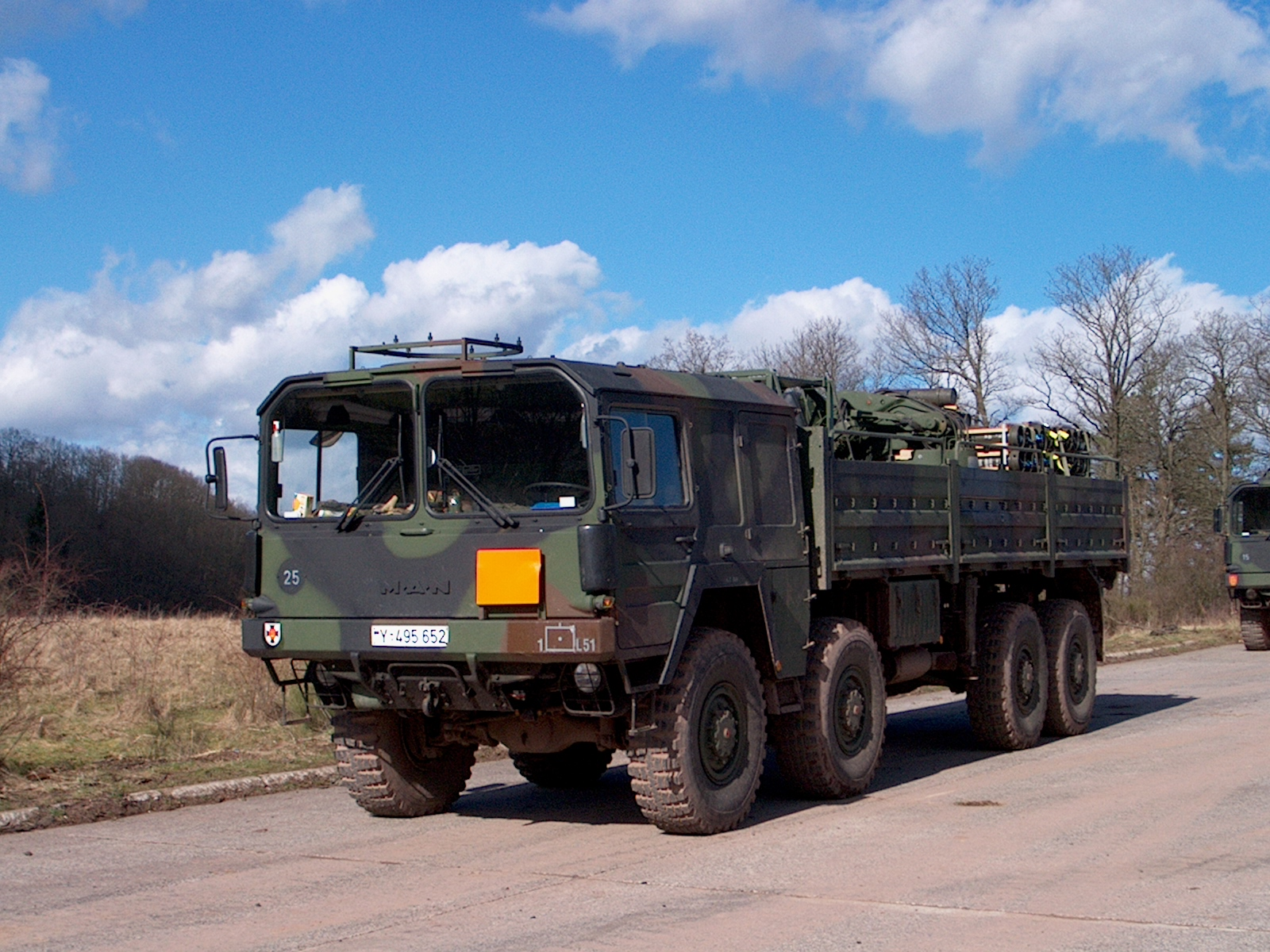 MAN 10to mil gl Einheit: 1./51 (BeobPzArtLBtl 51) Aufnahme: 18.03.2002 Truppenübungsplatz Baumholder